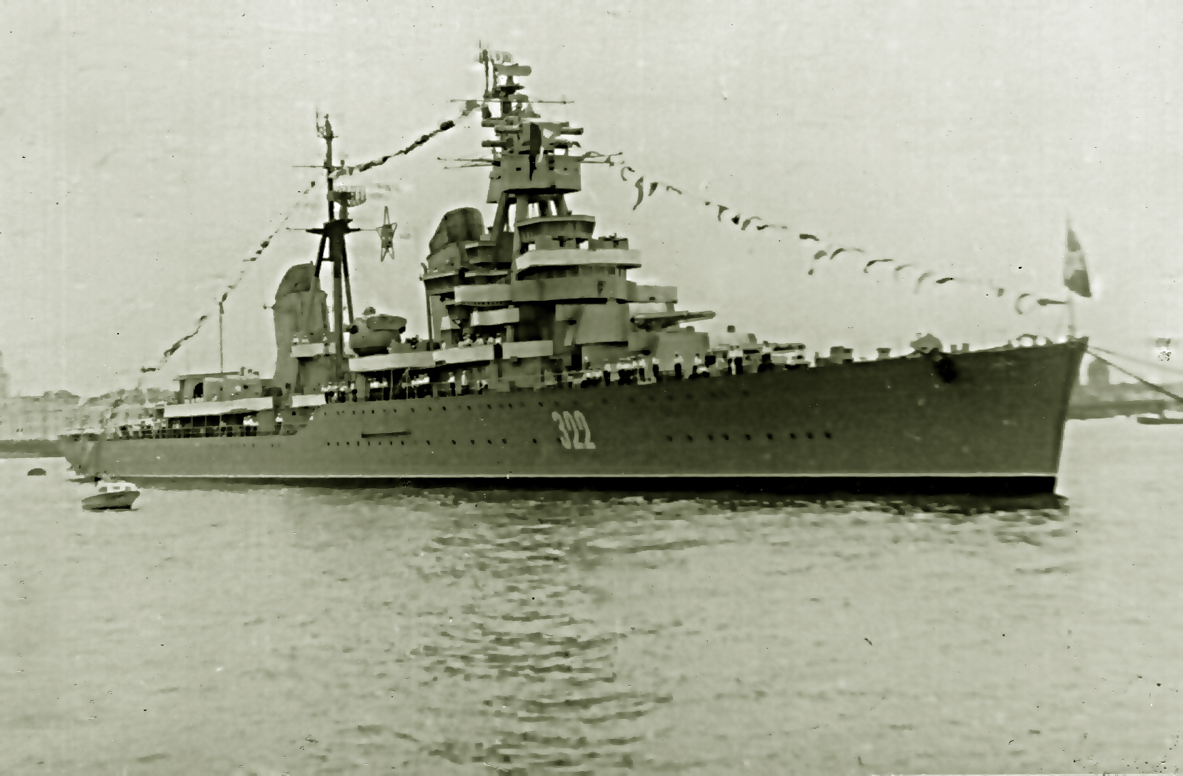 Cruiser Kirov in Newa